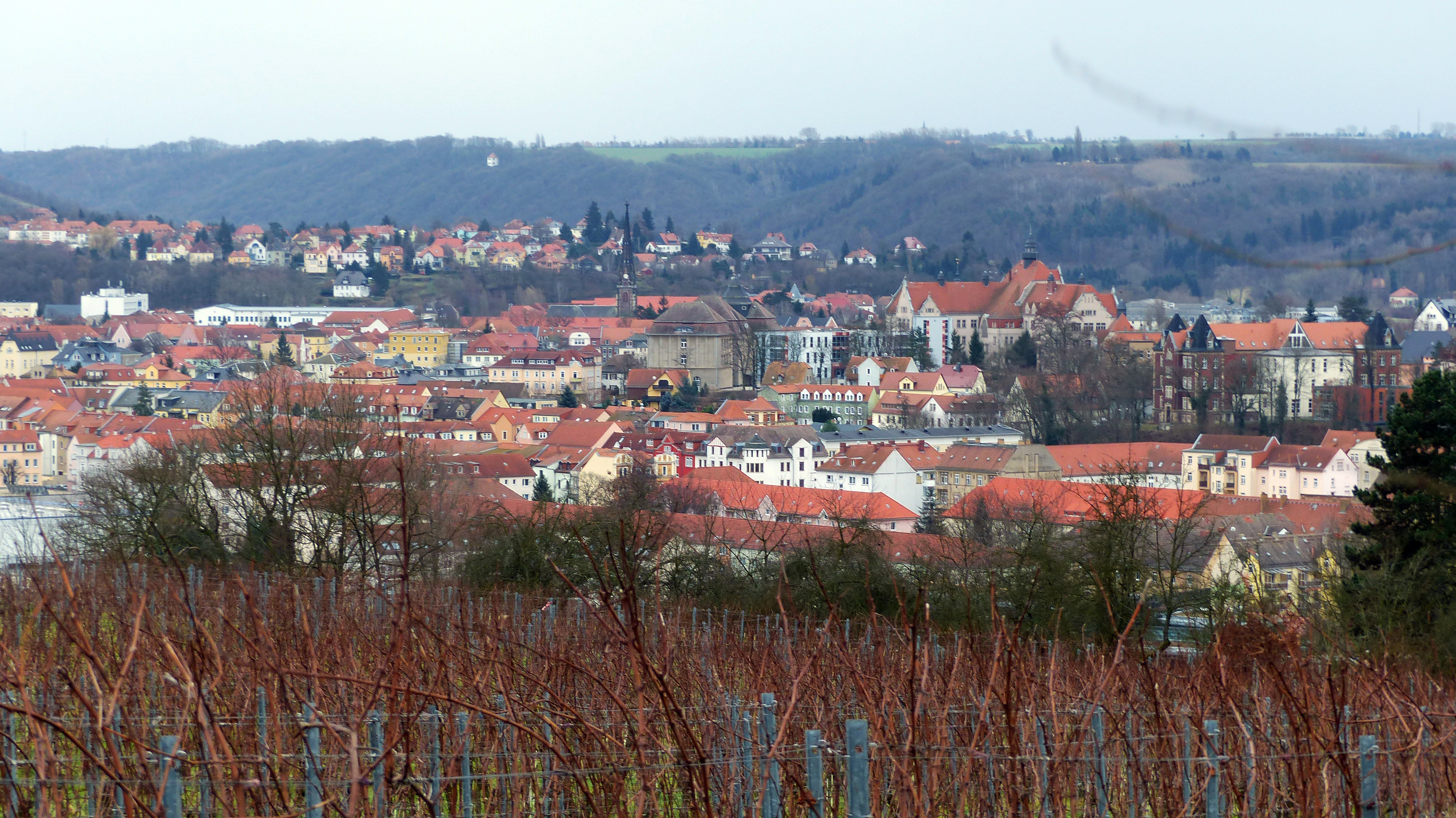 Blick von Proschwitz nach Süden auf die rechtselbisch gelegenen Stadtteile von Meißen